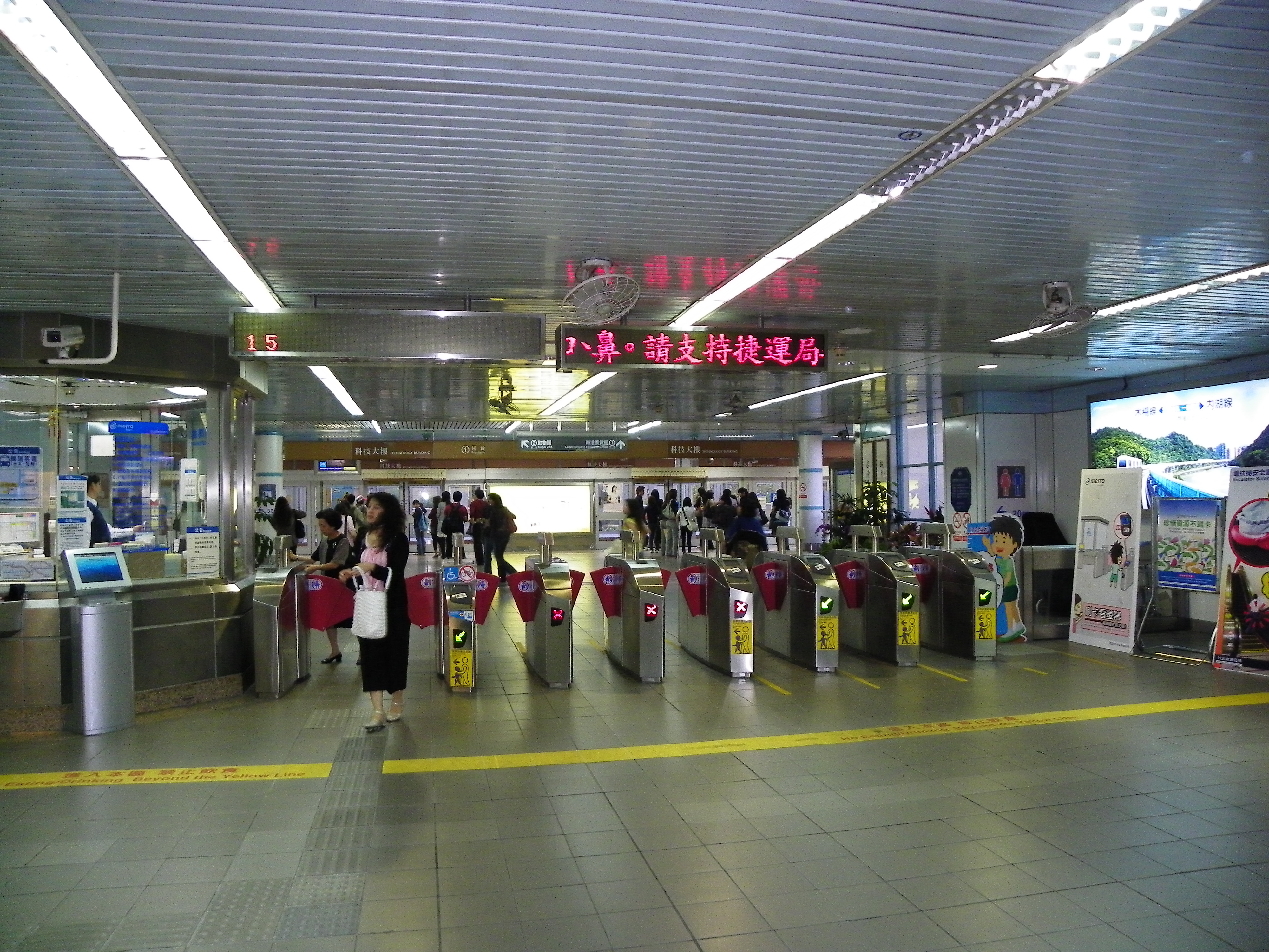 台北捷運文山線科技ビル駅改札前。